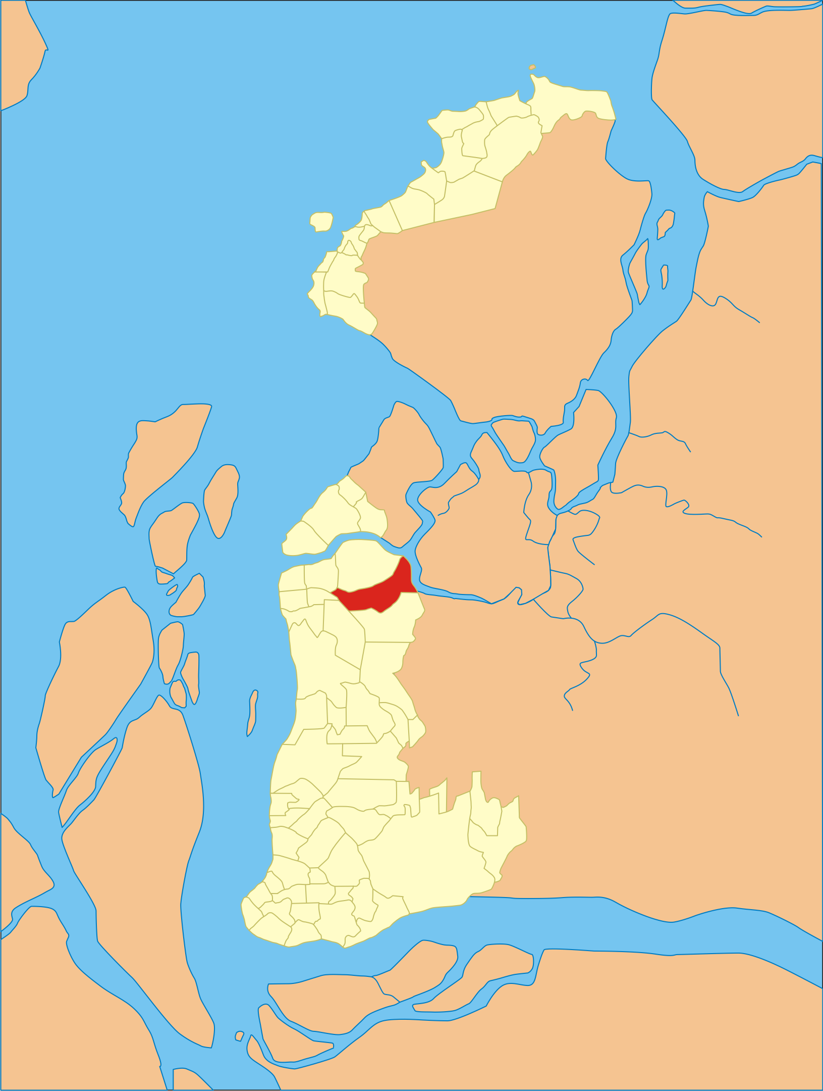 Localização do bairro em Belém do Pará